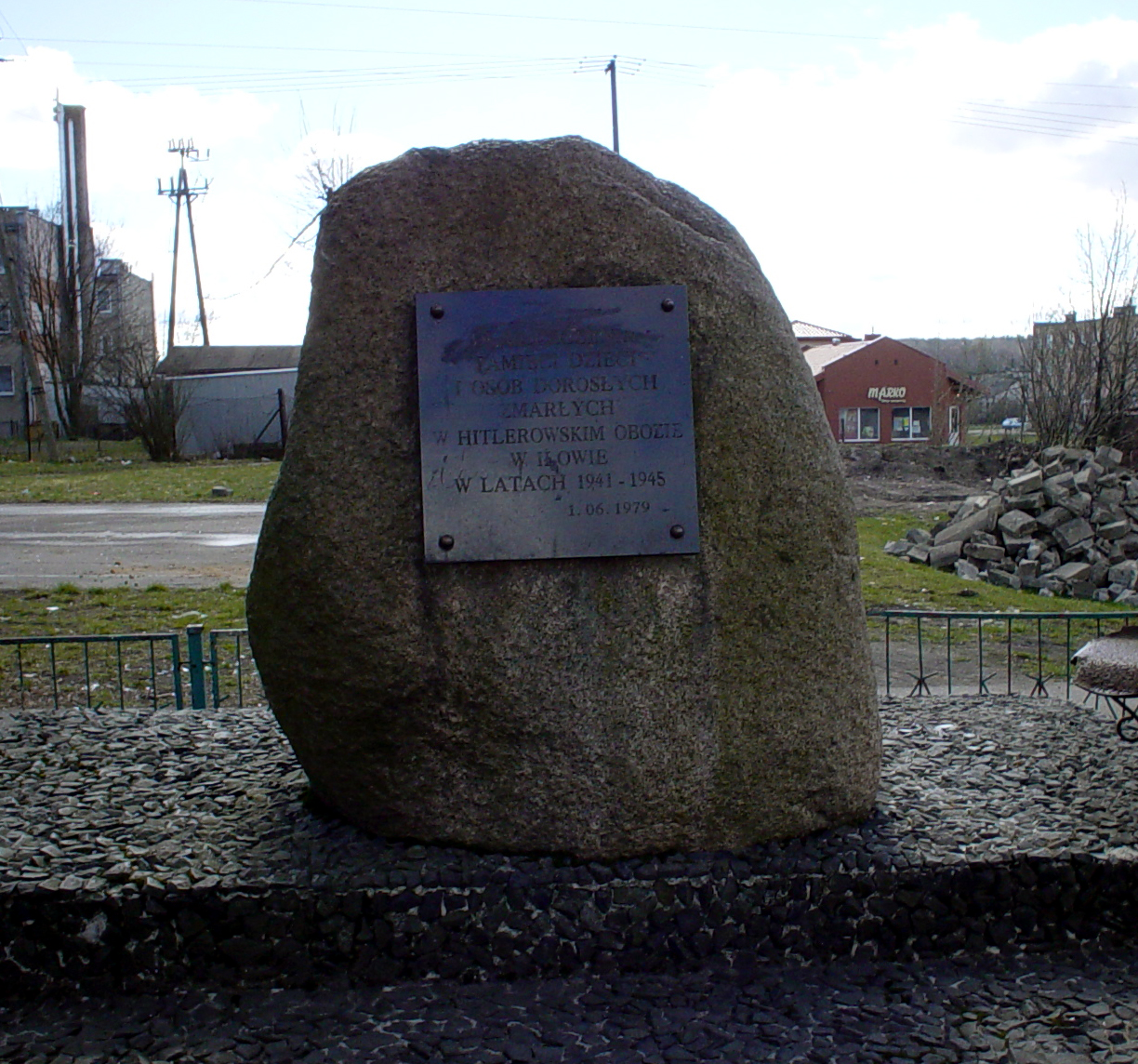 Pomnik pomordowanych dzieci w hitlerowskim obozie przejściowym w Iłowie, powiat działdowski, woj. warmińsko-mazurskie